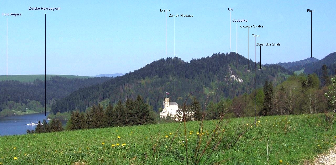 Widok ze wzgórza Tabor w Pieninach Spiskich na Pieniny Czorsztyńskie